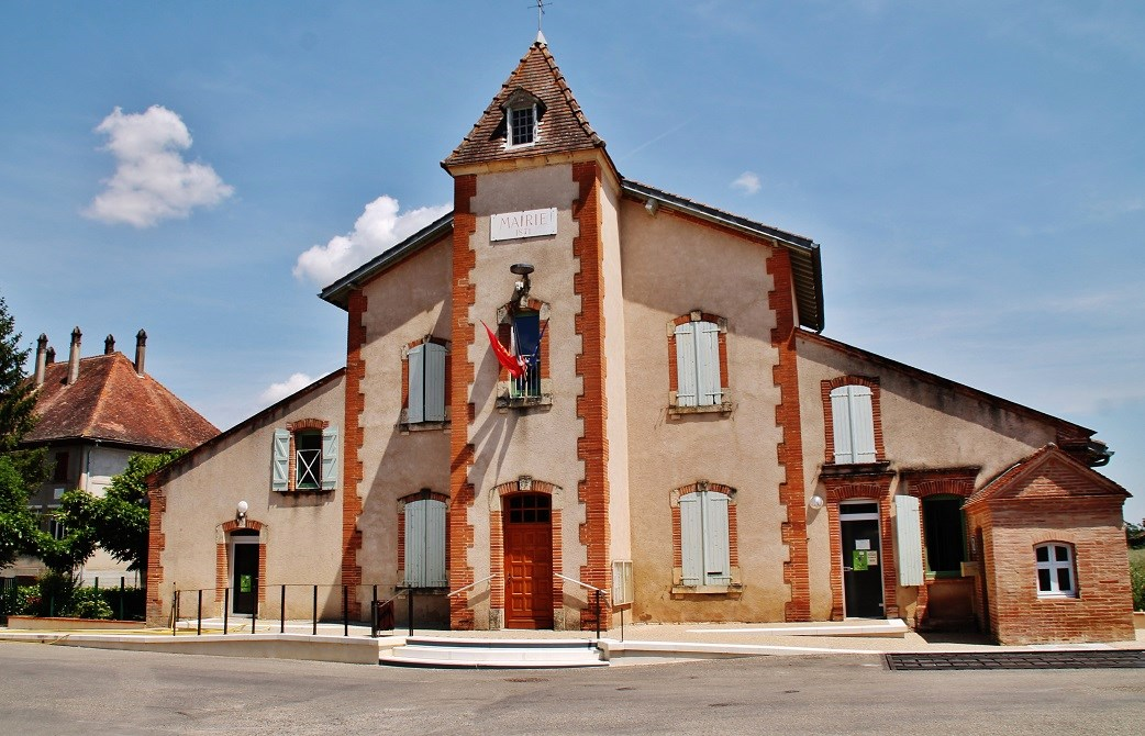 La Mairie